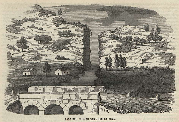 Paso del Ulla en San Juan da Cova, en la revista española Semanario Pintoresco Español.